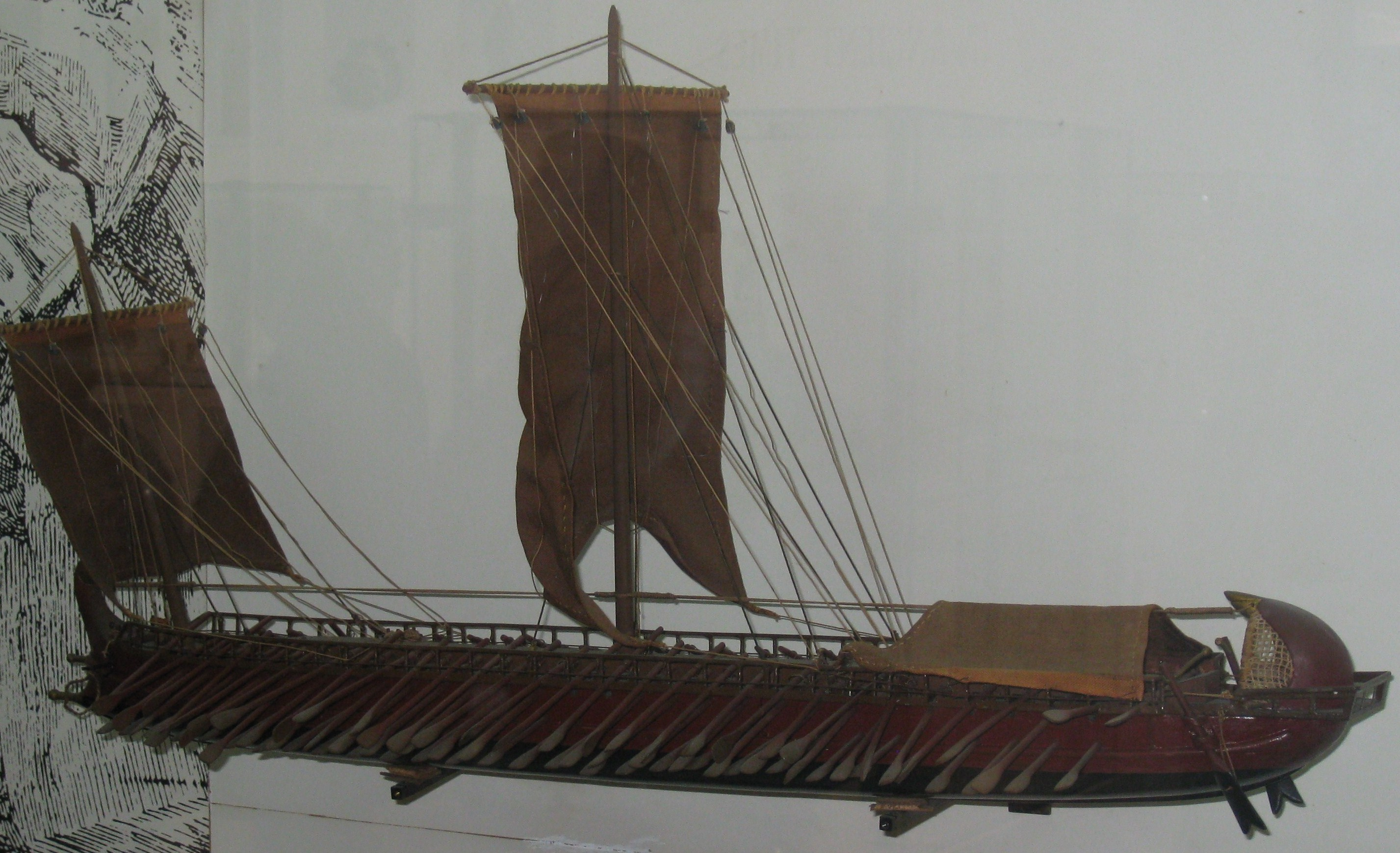 National Maritime Museum, Israel - Ship Models A modern model of a Trireme from Athens - warship from 480 BC. wood. Model built by S. Bosly and Y. Almog המוזיאון הימי הלאומי בחיפה דגמי ספינות דגם מודרני של טרירמה אתונאית. ספינות מלחמה מסוג זה היו בשימוש בשנת 480 לפני הספירה. הדגם, מעשה ידי ס. בוסלי ויוסף אלמוג